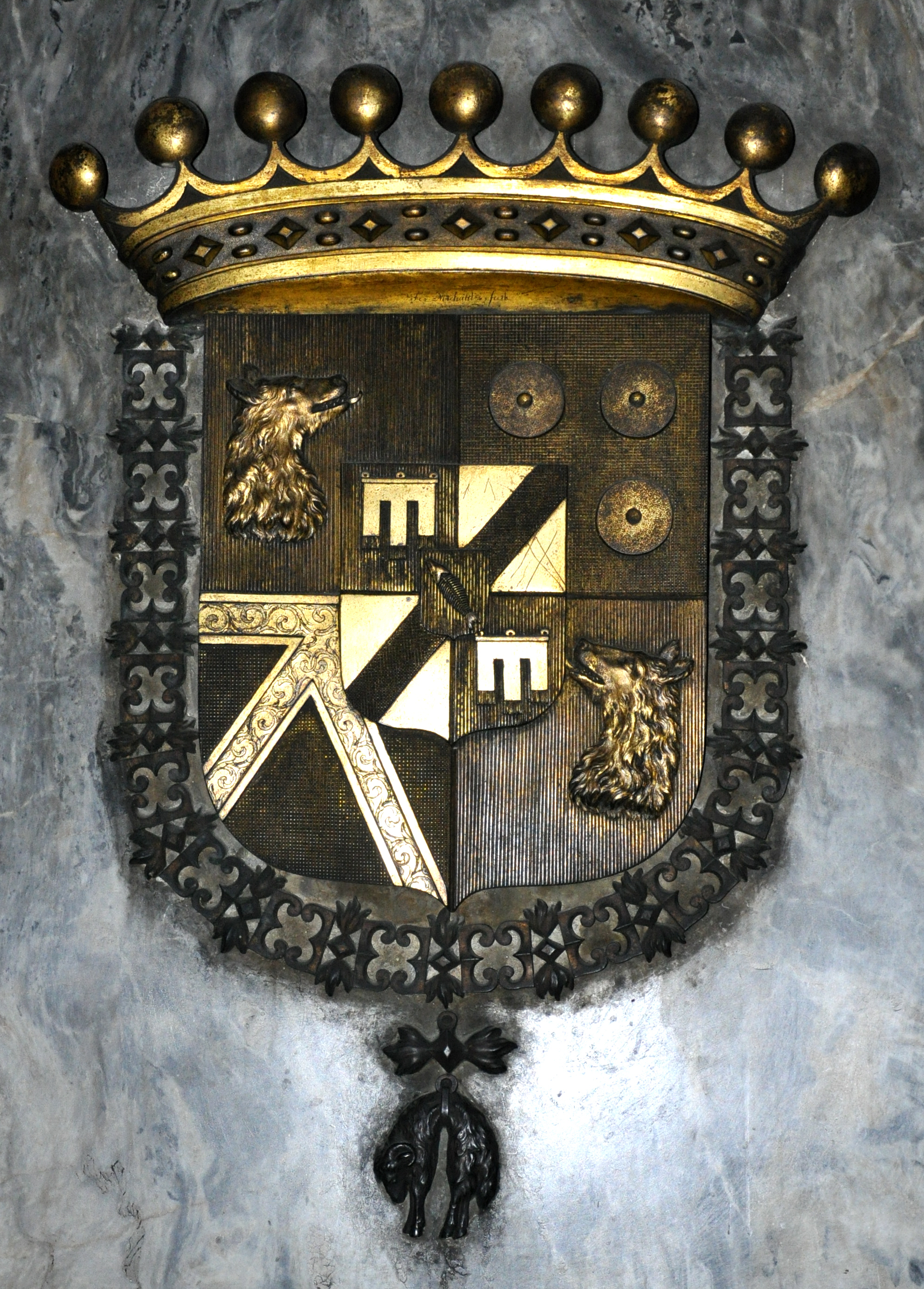 Wien, Schottenkirche, Vorraum, Epitaph der Maria Josepha Reinharda Raimunda Gräfin Windisch-Graetz, geb. Gräfin von Erdödy (5. April 1748–10. April 1777), Ehefrau des Joseph-Niklas zu Windisch-Graetz, Detail: Wappen Windisch-Graetz (mit Ordenskette vom Goldenen Vlies)